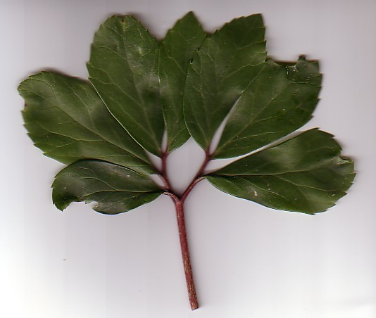 Leaf of Helleborus niger